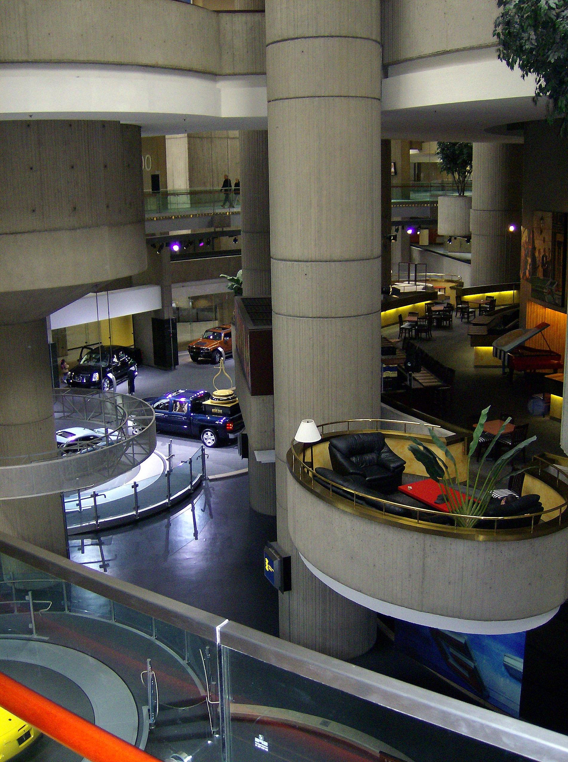 Detroit Marriot Hotel restaurant - at the Renaissance Center.